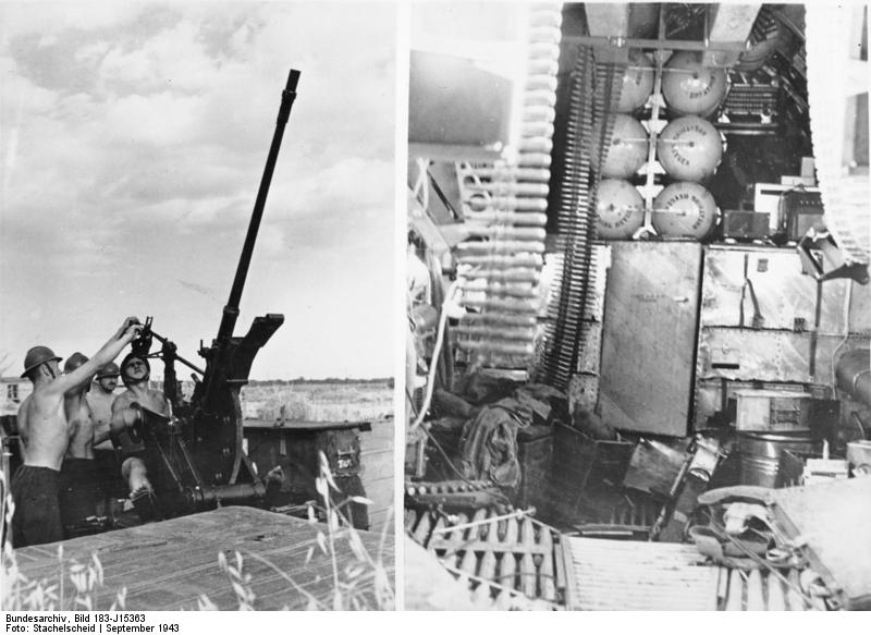 Ploesti, Flak und abgeschossener Bomber Der gescheiterte Luftangriff der Amerikaner auf Ploesti Bei einem Versuch , einen Schlag gegen die rumänischen Ölfelder von Ploesti zu führen, erlitten die angreifenden amerikanischen Bomberverbände durch die sofort einsetzende deutsch-rumänische Jagd- und Flakabwehr schwerste Verlust. - UBz.: links ein leichtes rumänisches Flakgeschütz, das drei amerikanische Bomber zur Strecke brachte. Rechts sehen wir in das Innere eines der zahlreichen bei dem Angriff zum Absturz gebrachten amerikanischen Grossbombers. PK-Kriegsberichter Stachelscheid 13.9.43